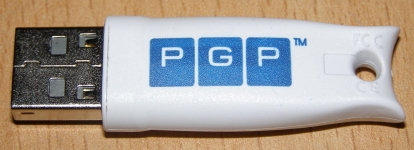 Aladdin eToken Pro64K